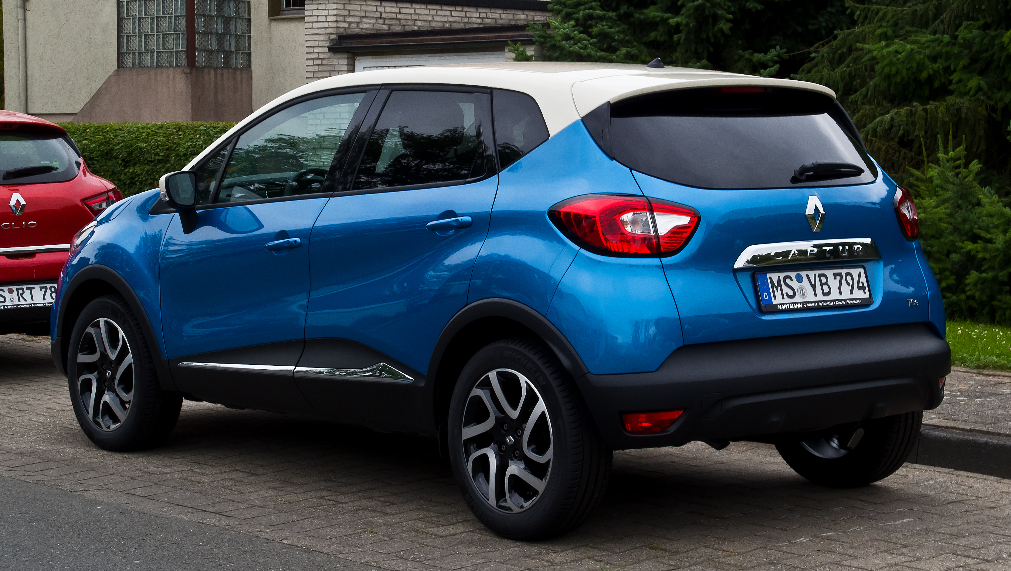 Renault Captur Luxe ENERGY TCe 90 Start & Stop eco²